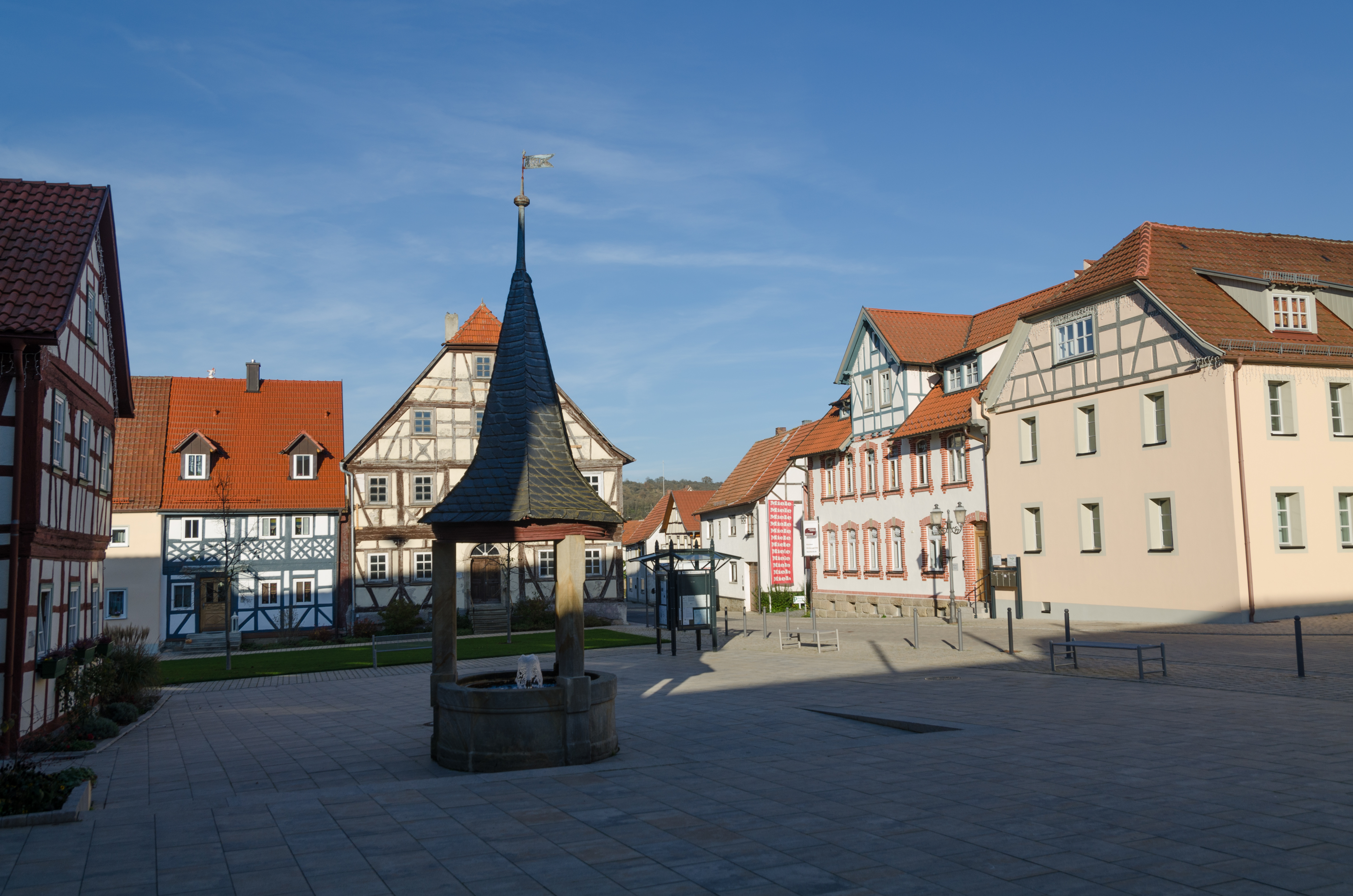 Stadtlauringen, Marktplatz, Brunnen